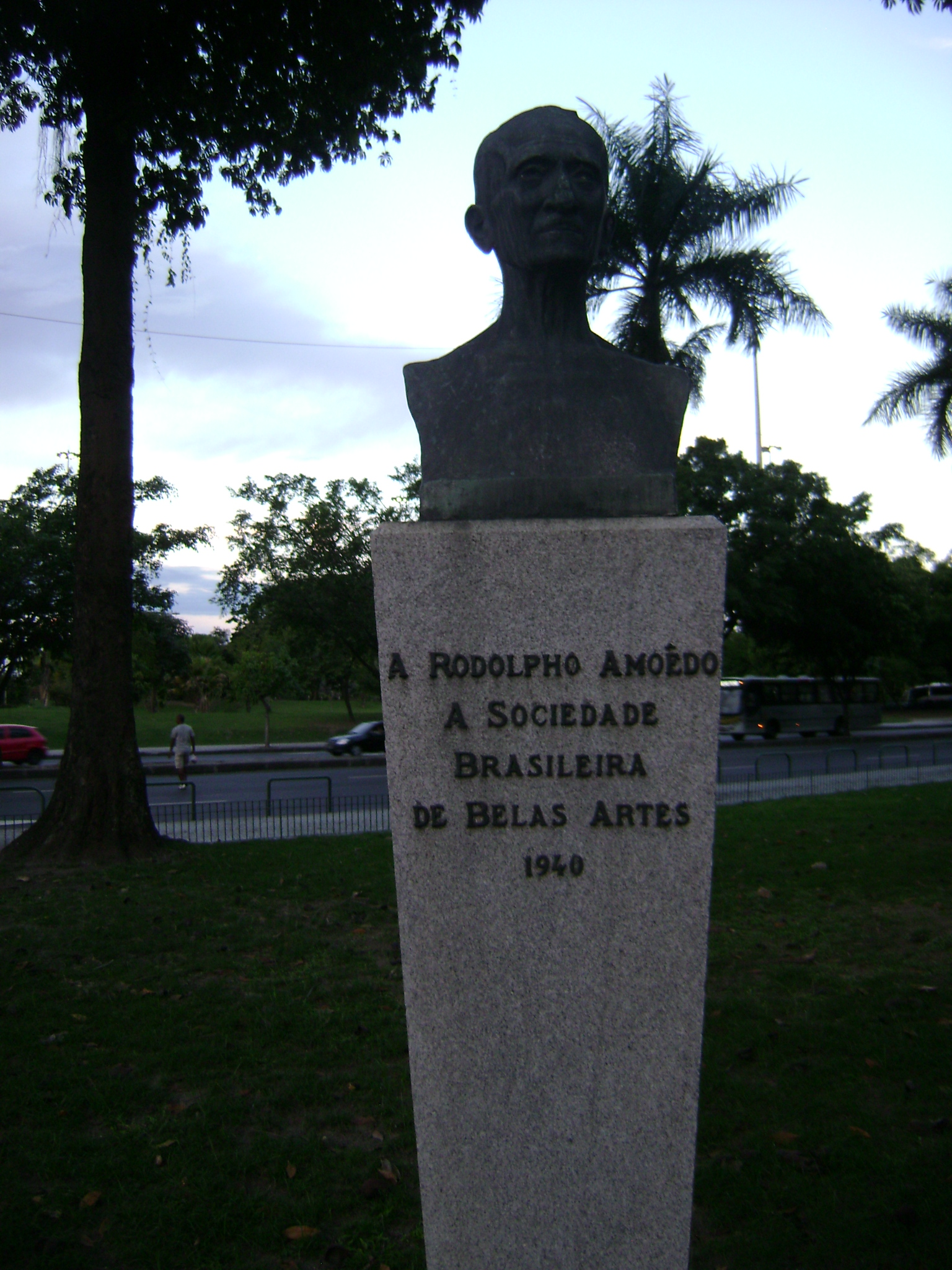 Estátua de Rodolpho Amoêdo no Rio de Janeiro, Brasil.